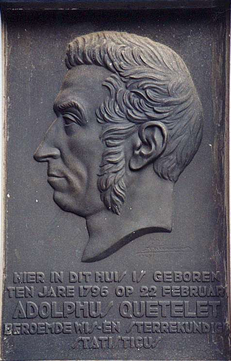 Gedenkplaat Adolphe Quetelet in Gent